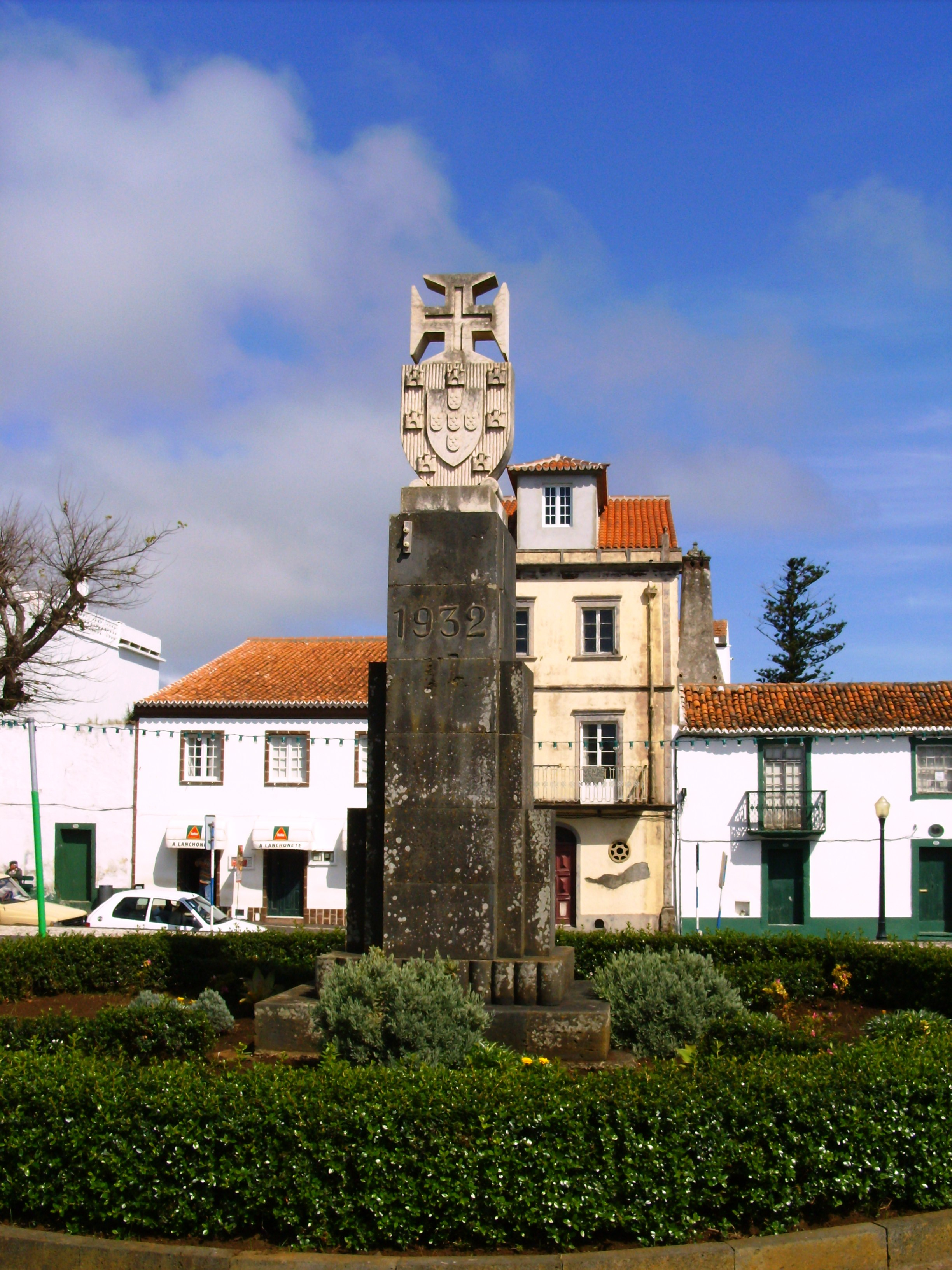 Monumento comemorativo do Descobrimento da Ilha de Santa Maria em Vila do Porto (Açores), Portugal.